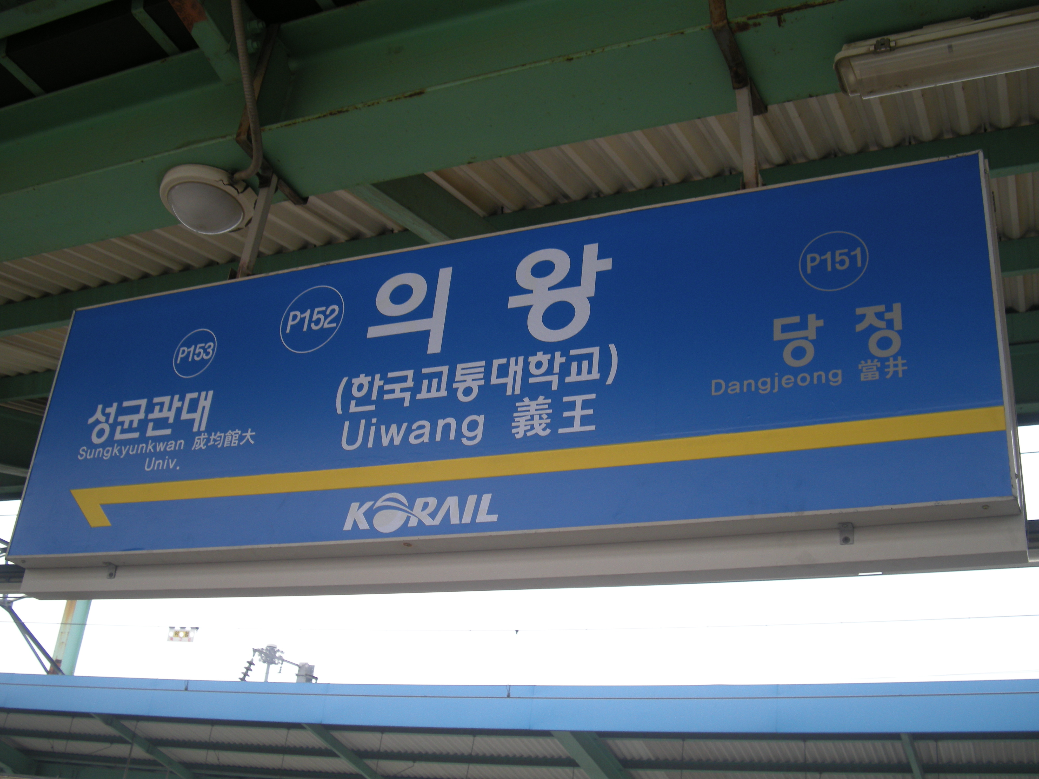 경부선 (수도권 전철 1호선) 의왕역 역명판